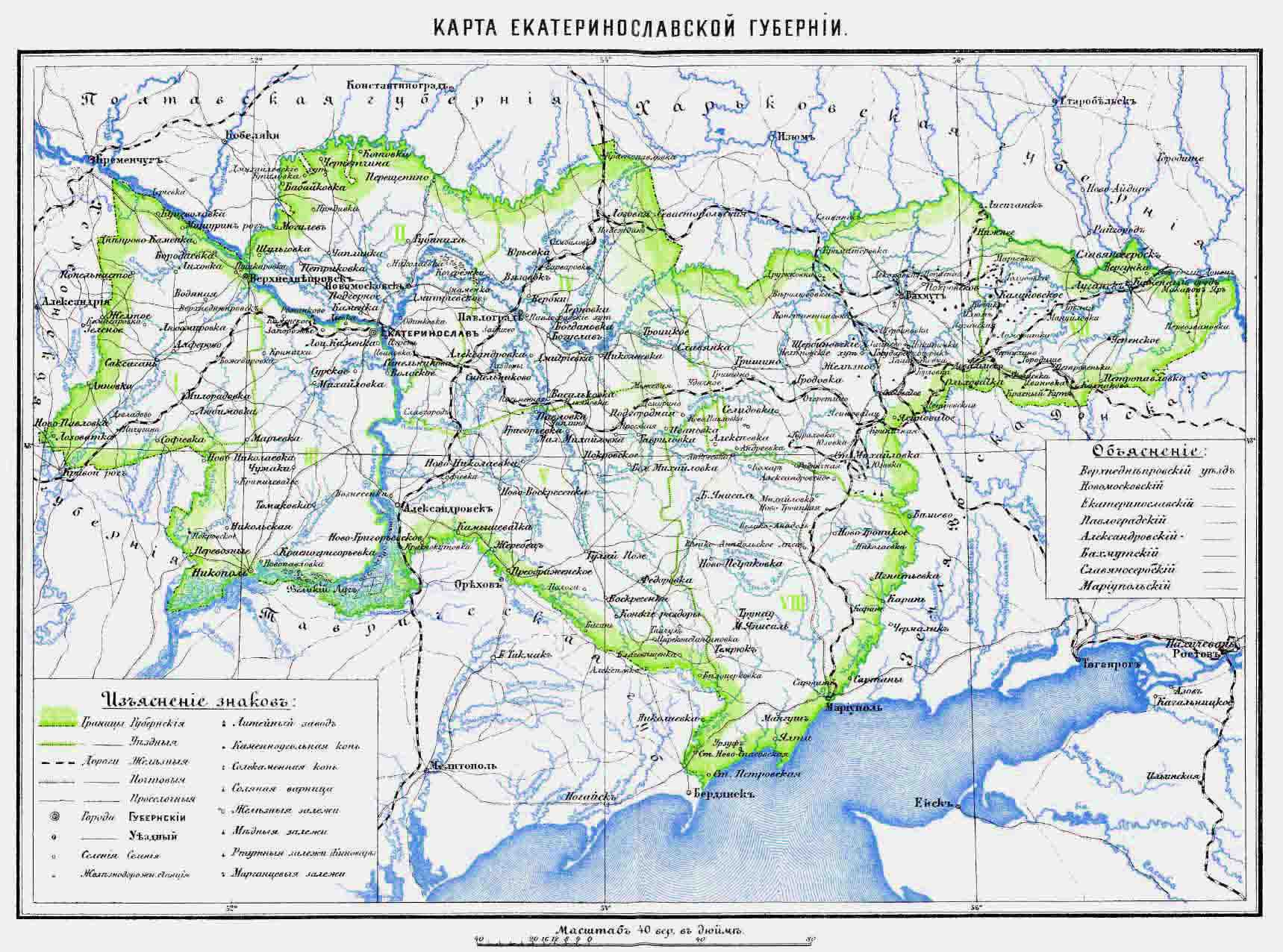 Карта Екатеринославской губернии из ЭСБЕ